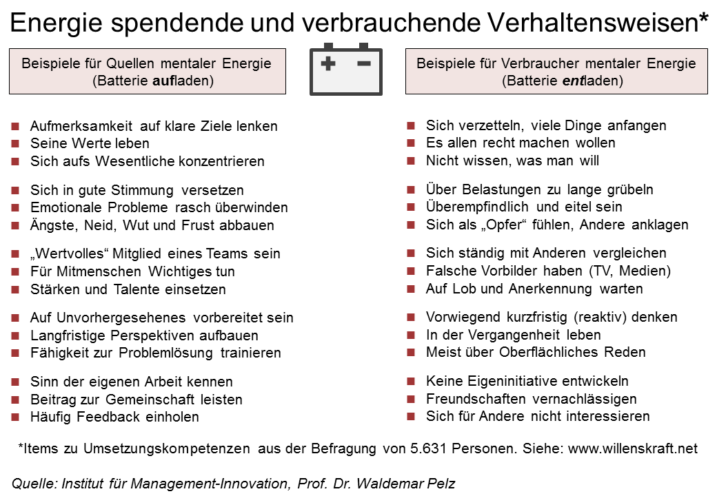 Wie man Menschen motivieren kann (Energiequellen und -verbraucher)